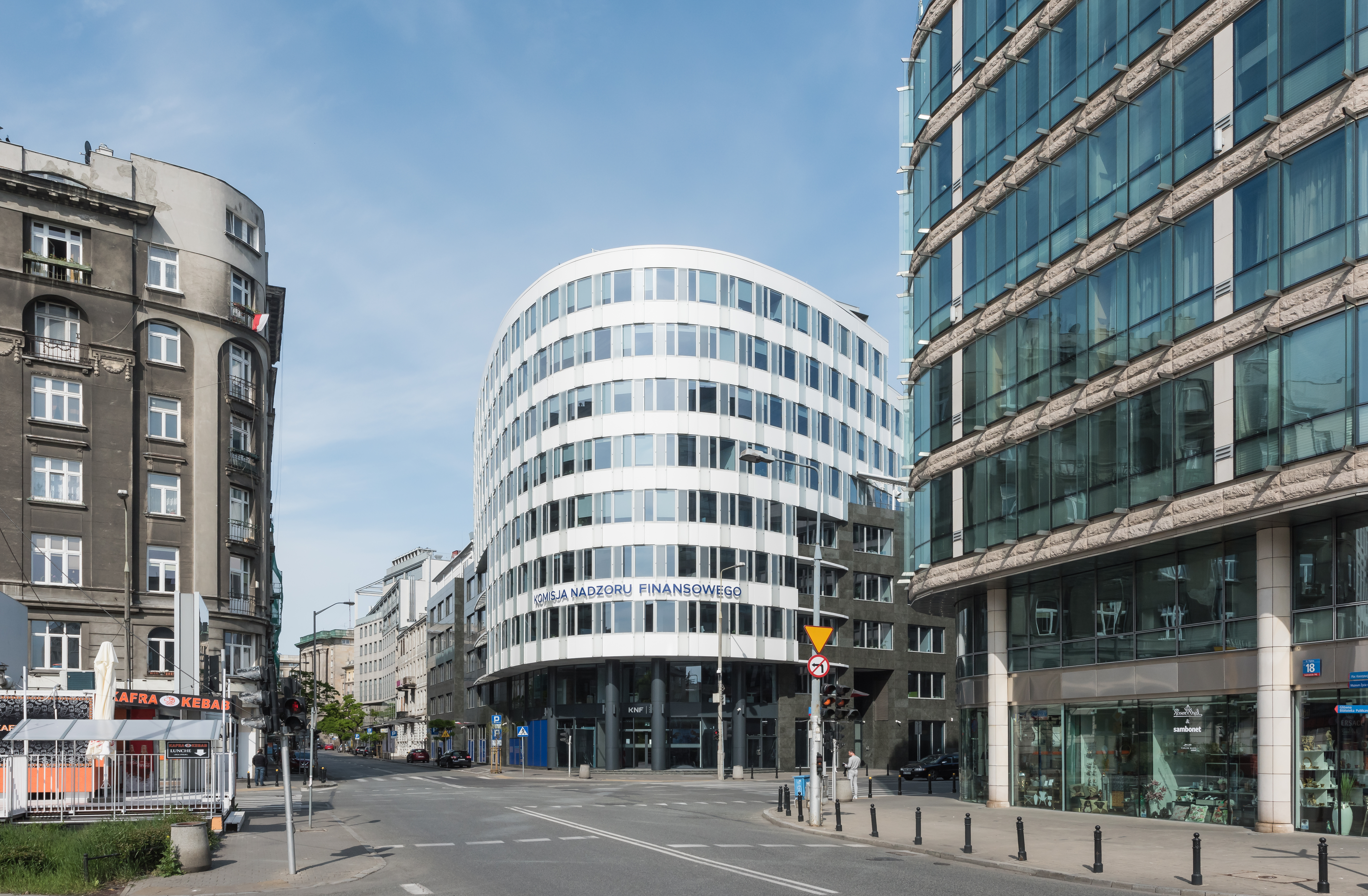 Ulica Piękna przy Kruczej w Warszawie